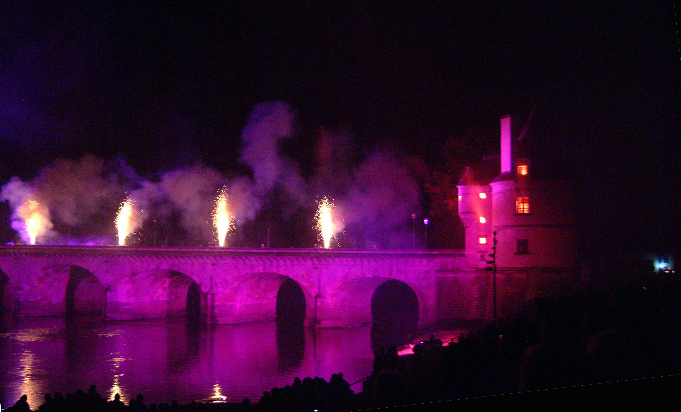 Le pont Henri-IV vu de la rive Ouest au Nord du pont, photographié lors de la commémoration de son 400e anniversaire en Septembre 2009.